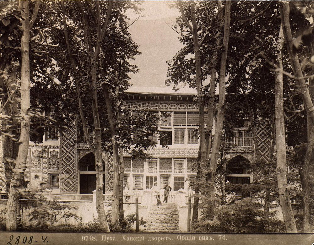 Фасад ханского дворца в Нухе